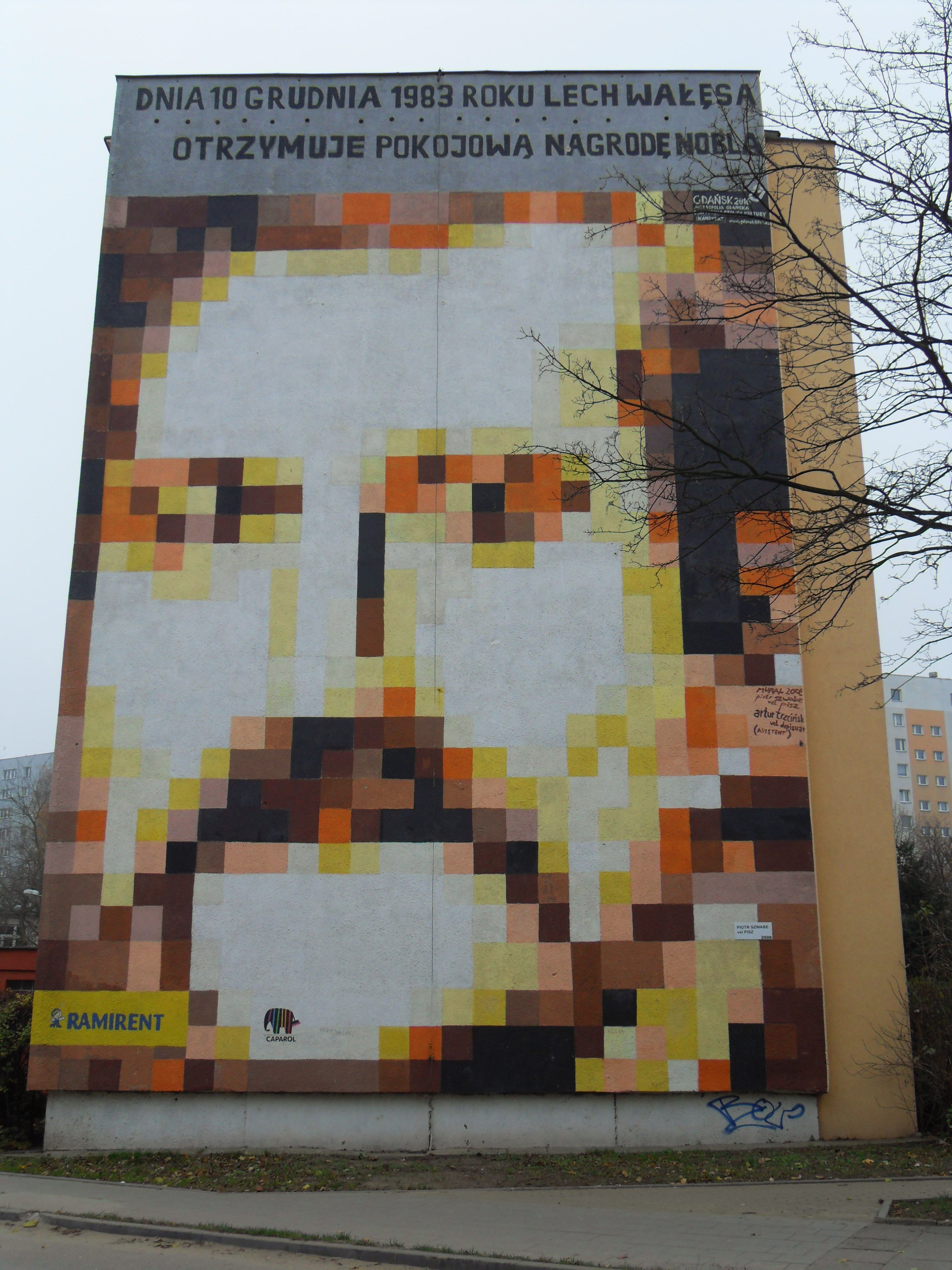 Gdańsk Zaspa Młyniec, ul. Pilotów 17. Blok, w którym mieszkał Lech Wałęa. Autor muralu: Piotr Szwabe.